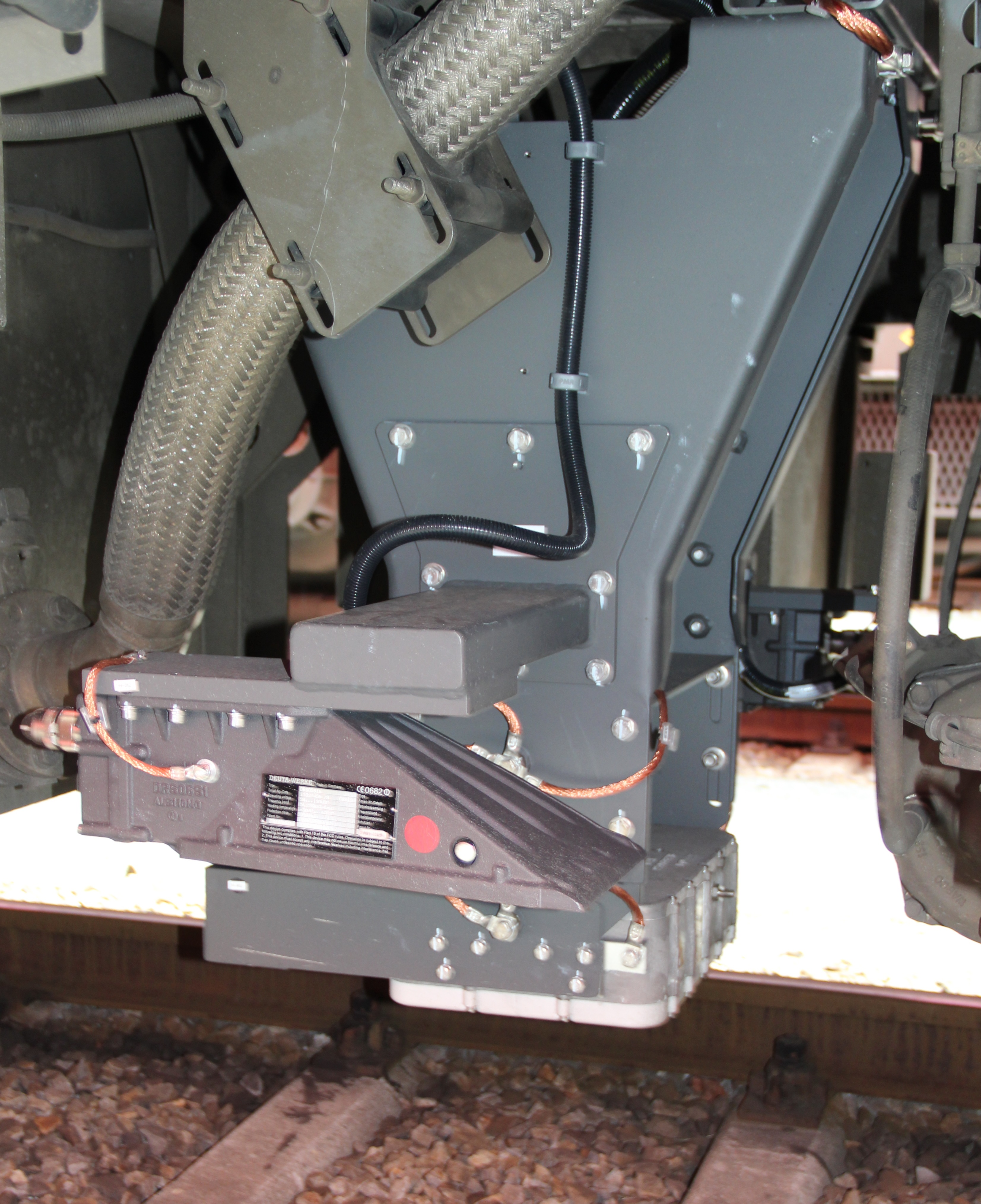 Die ETCS-Antenne mit Radar Geschwindigkeitssensor einer ÖBB 1116 zwischen den beiden Drehgestellen